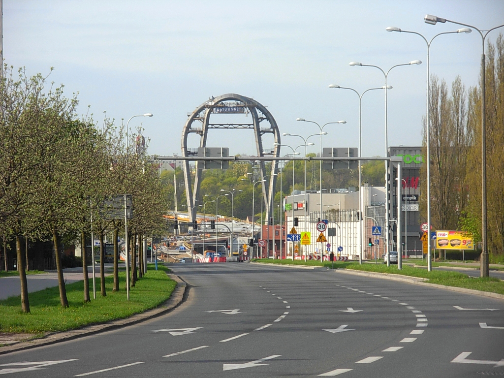 Trasa Uniwersytecka w Bydgoszczy - fragment ul. Ogińskiego